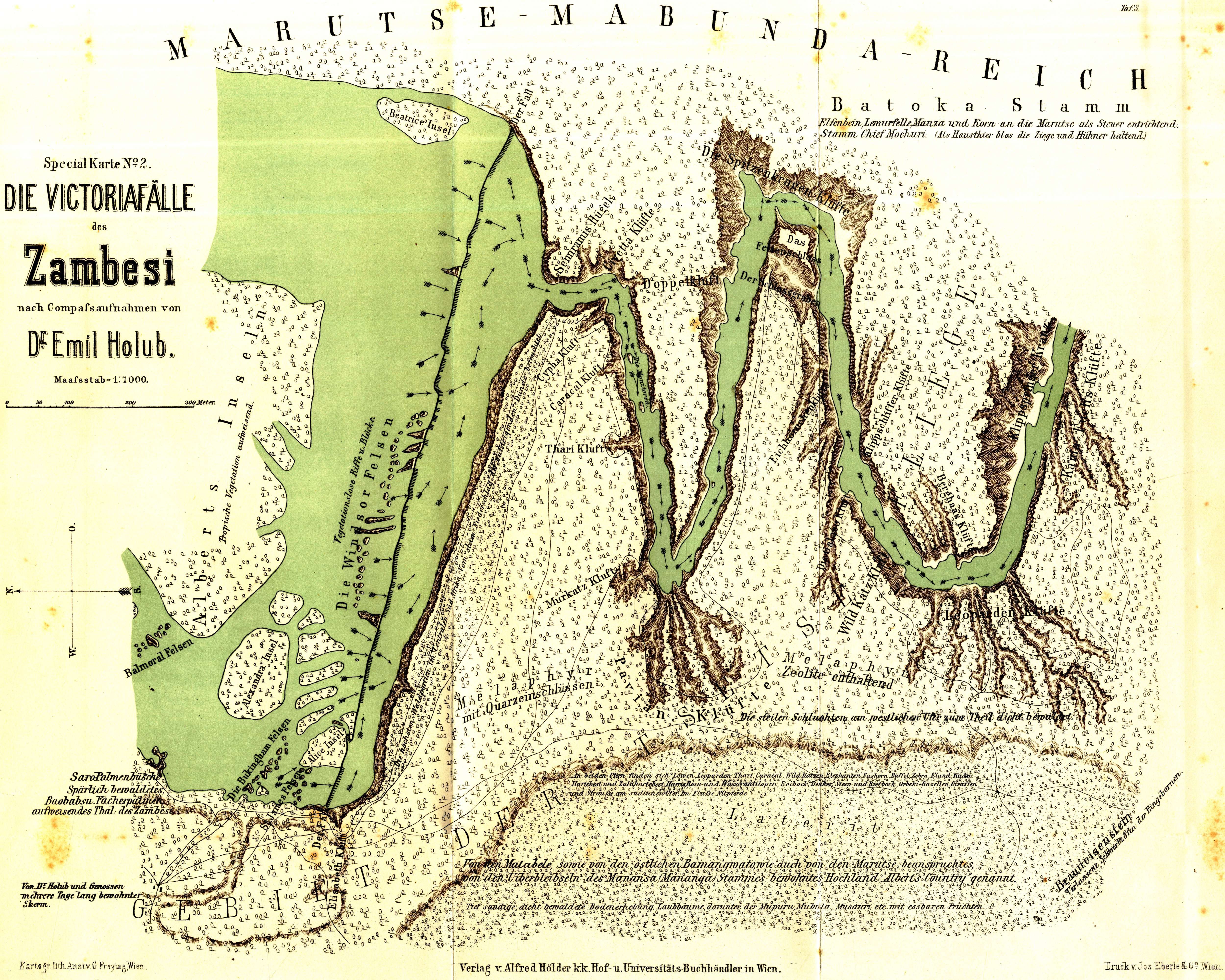 Emil Holub (Holice, 1847. október 7. – Bécs, 1902. február 21.), cseh orvos, utazó, Afrika-felfedező, író, néprajzi gyűjtő térképe a Viktória vízesésről